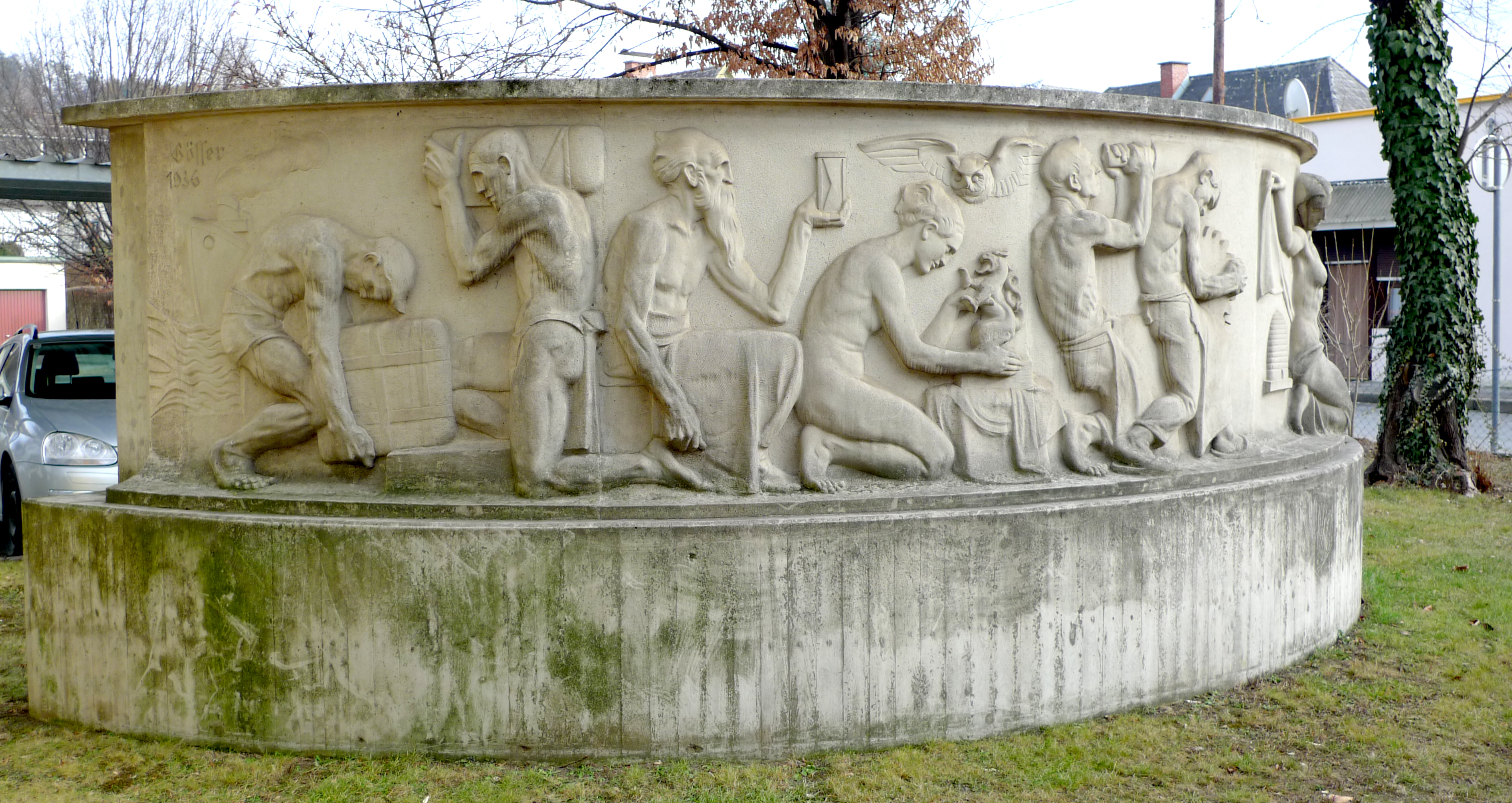 Relief von Wilhelm Gösser, 1936 für das Eckhaus Joanneumring - Am eisernen Tor geschaffen, derzeit im Garten der Kath. Expositur Christus Salvator in Graz an der Körösistraße aufgestellt.